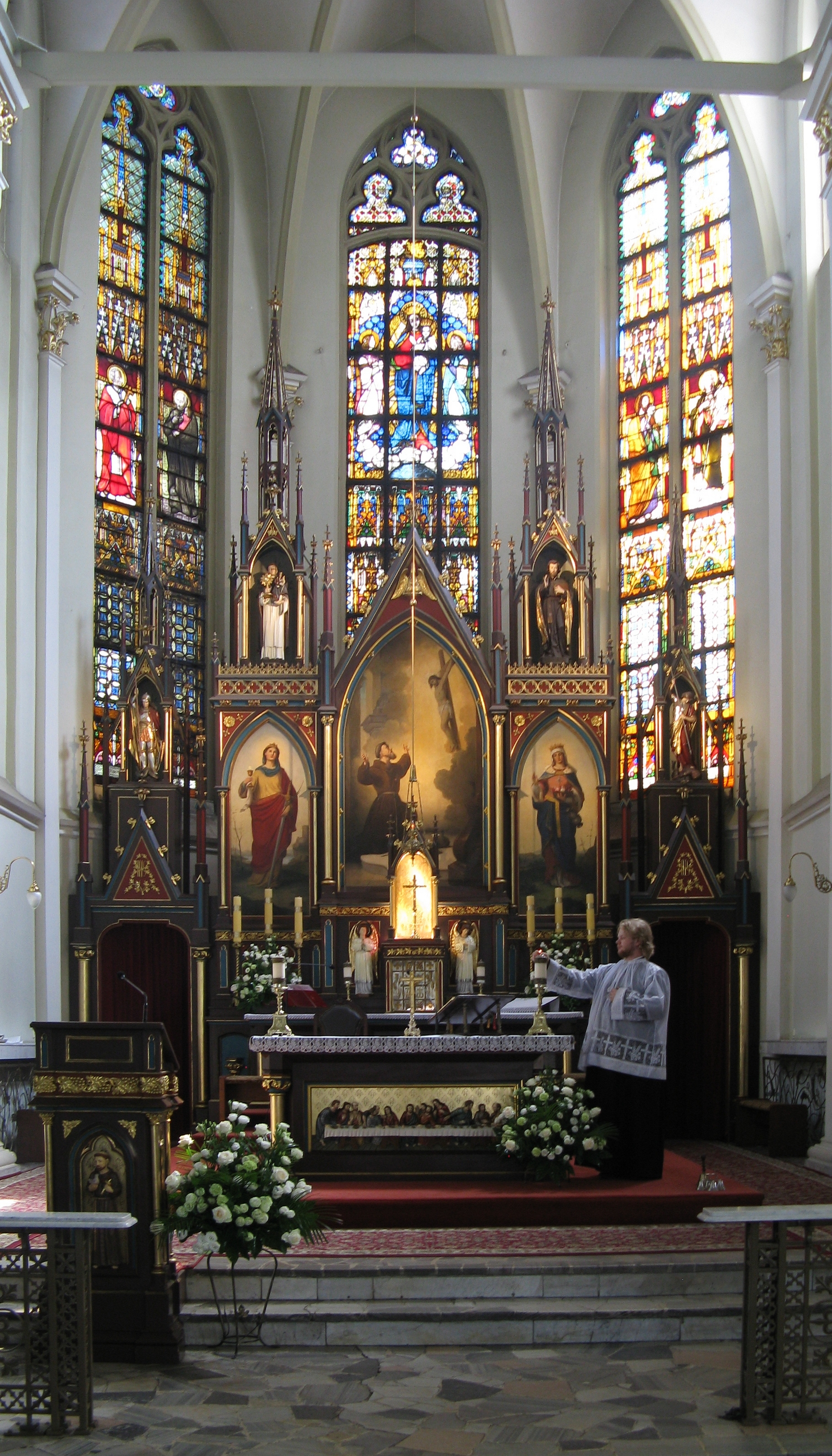 Ołtarz główny, wnętrze kościoła św. Franciszka w Zabrzu-Zaborzu.